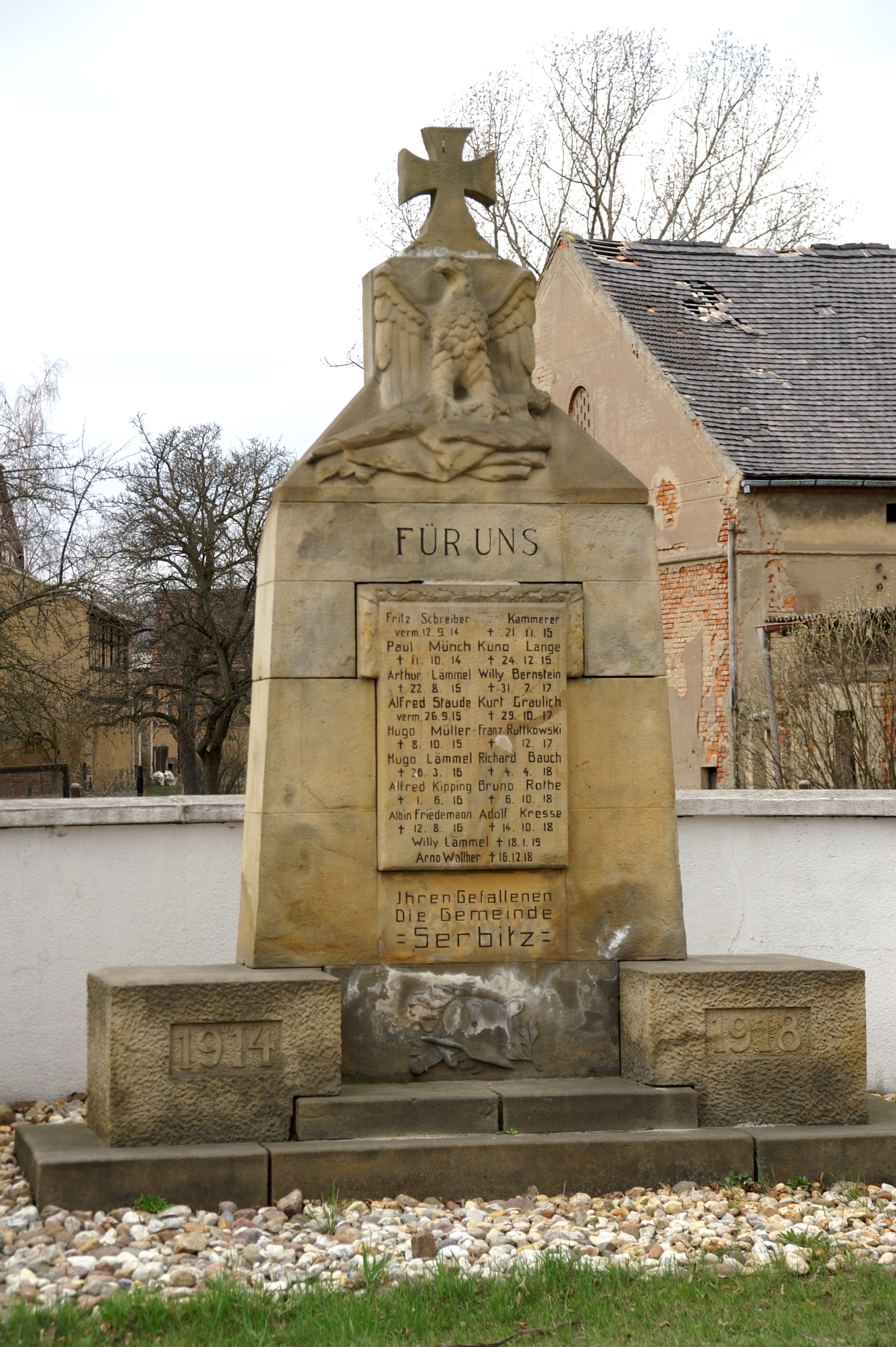 Denkmal in Serbitz